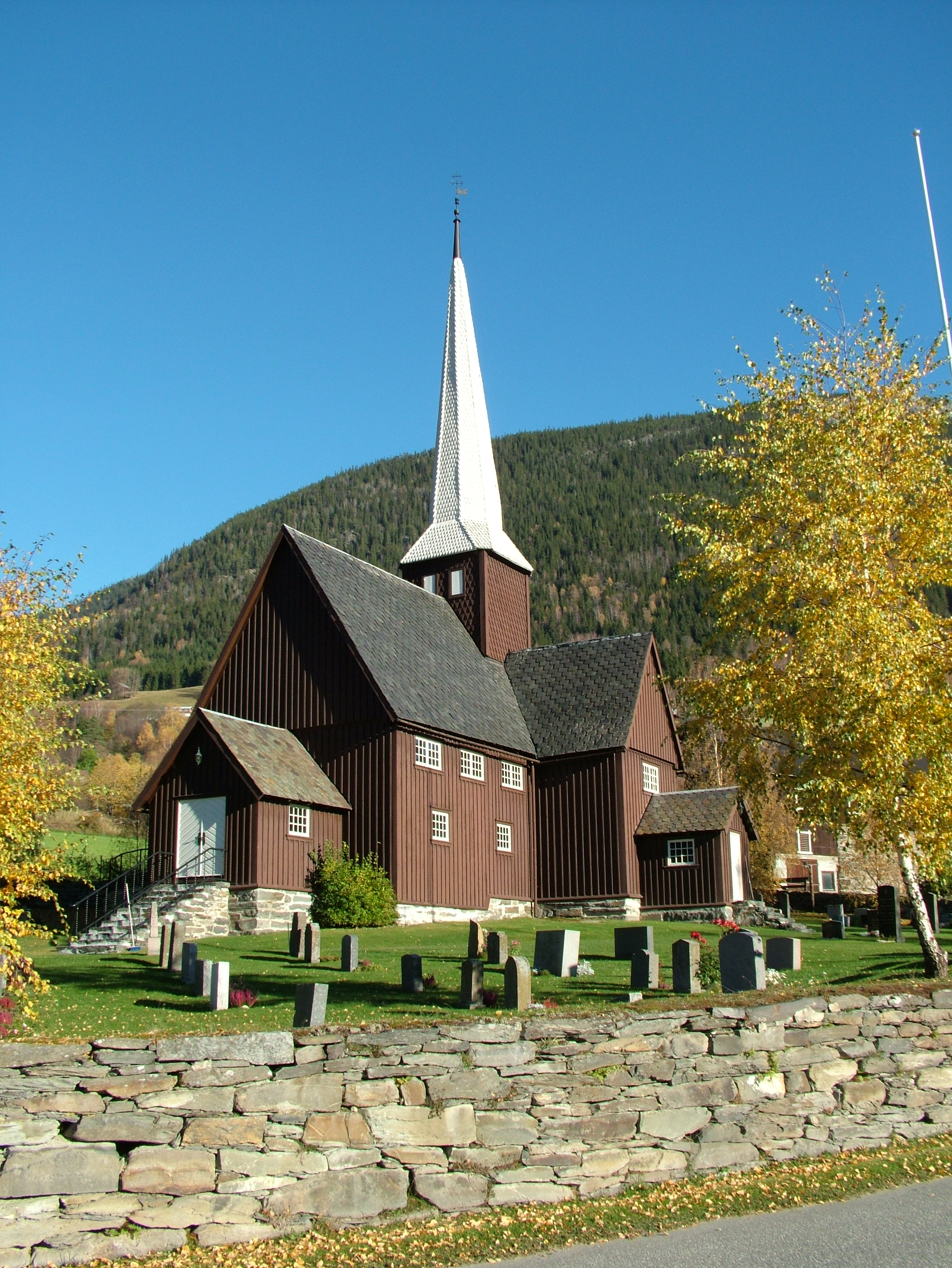 Fåvang kirke, Norway